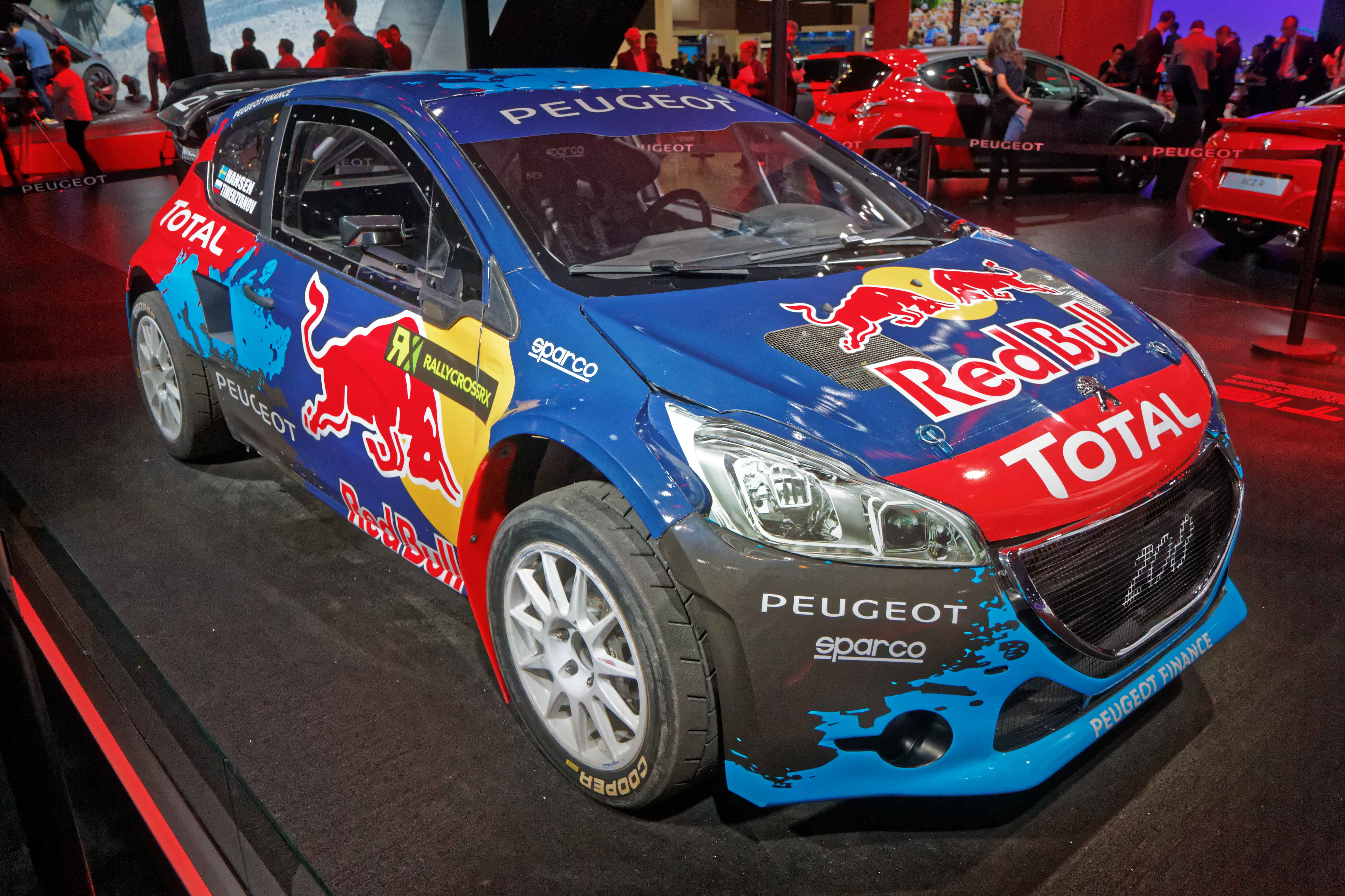 Une Peugeot 208 WRX présentée lors du mondial de l'automobile de Paris 2014.